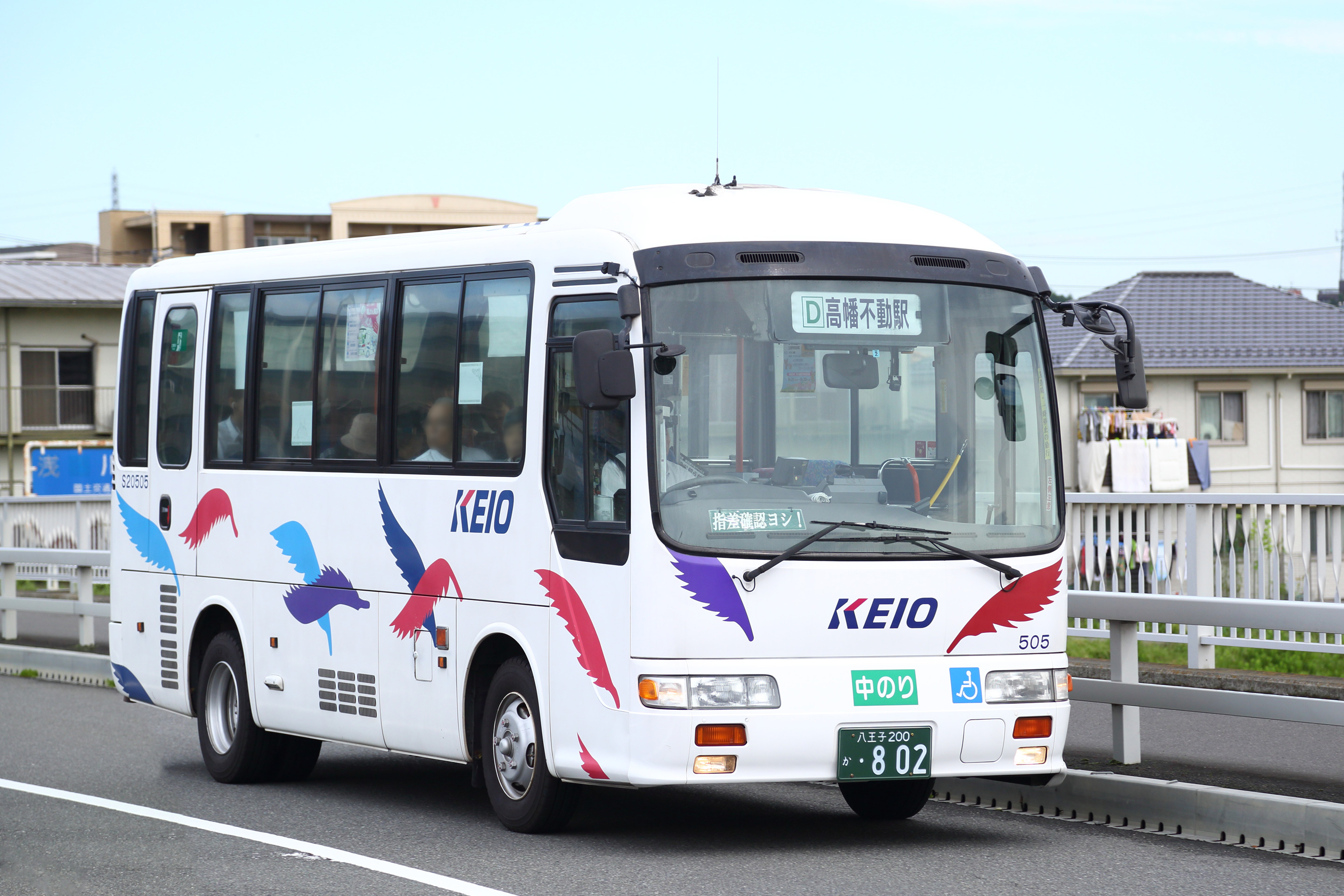 日野市ミニバス、南平路線D「系統」を走るja:日野・リエッセ。 ※ 加工箇所あり